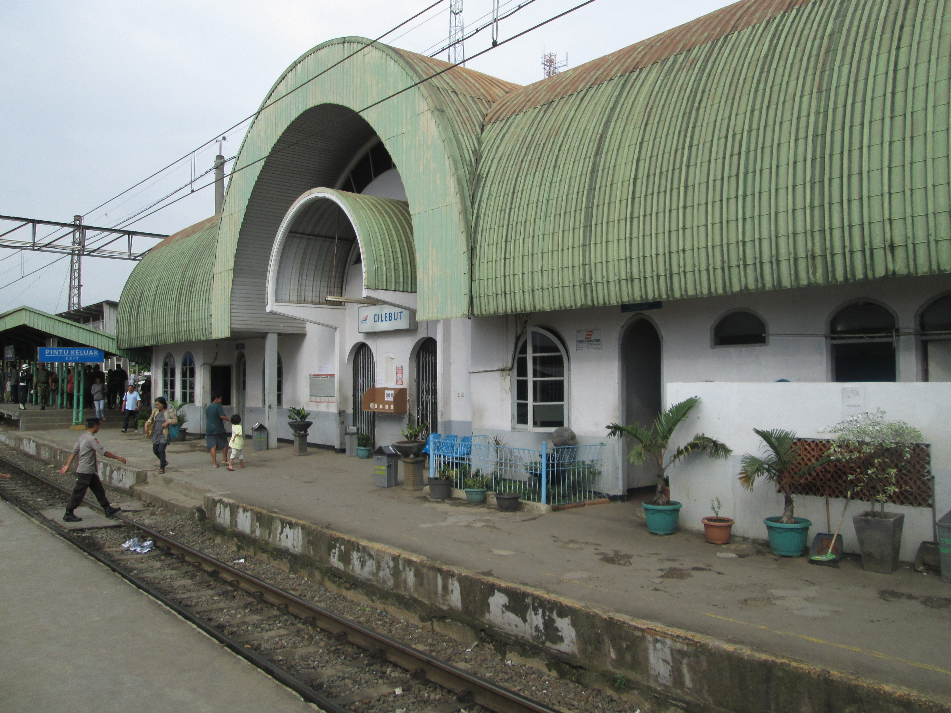 Stasiun Cilebut